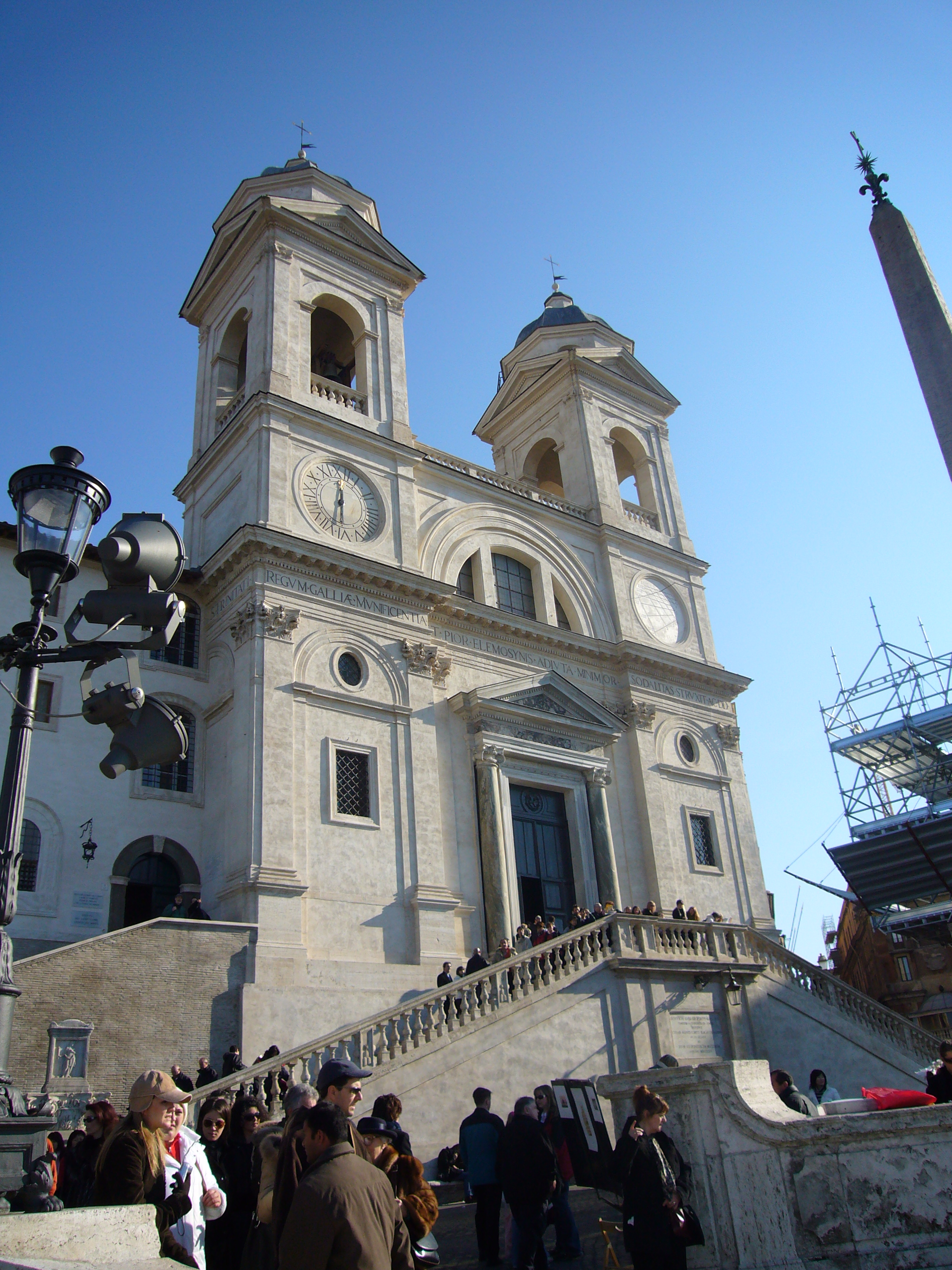 Roma, Trinità dei Monti alla fine della passeggiata del Pincio